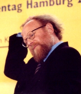 Wolfgang Thierse, Katholikentag Hamburg 2000, Podiumsdiskussion